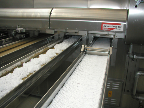 Teppich-Garn nach einer Heatsetting-Maschine